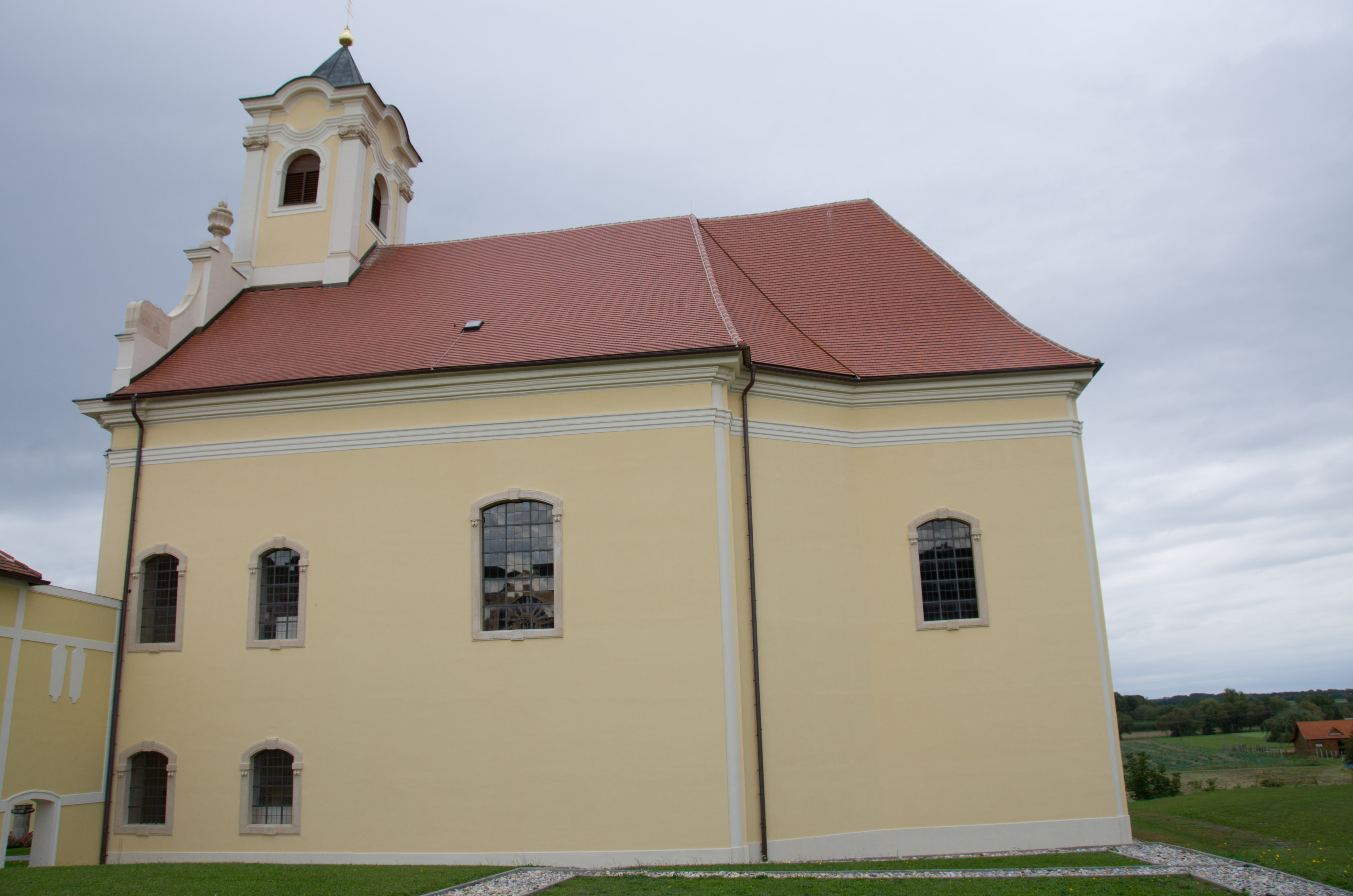 Kath. Pfarrkirche hl. Georg und Mariae Himmelfahrt